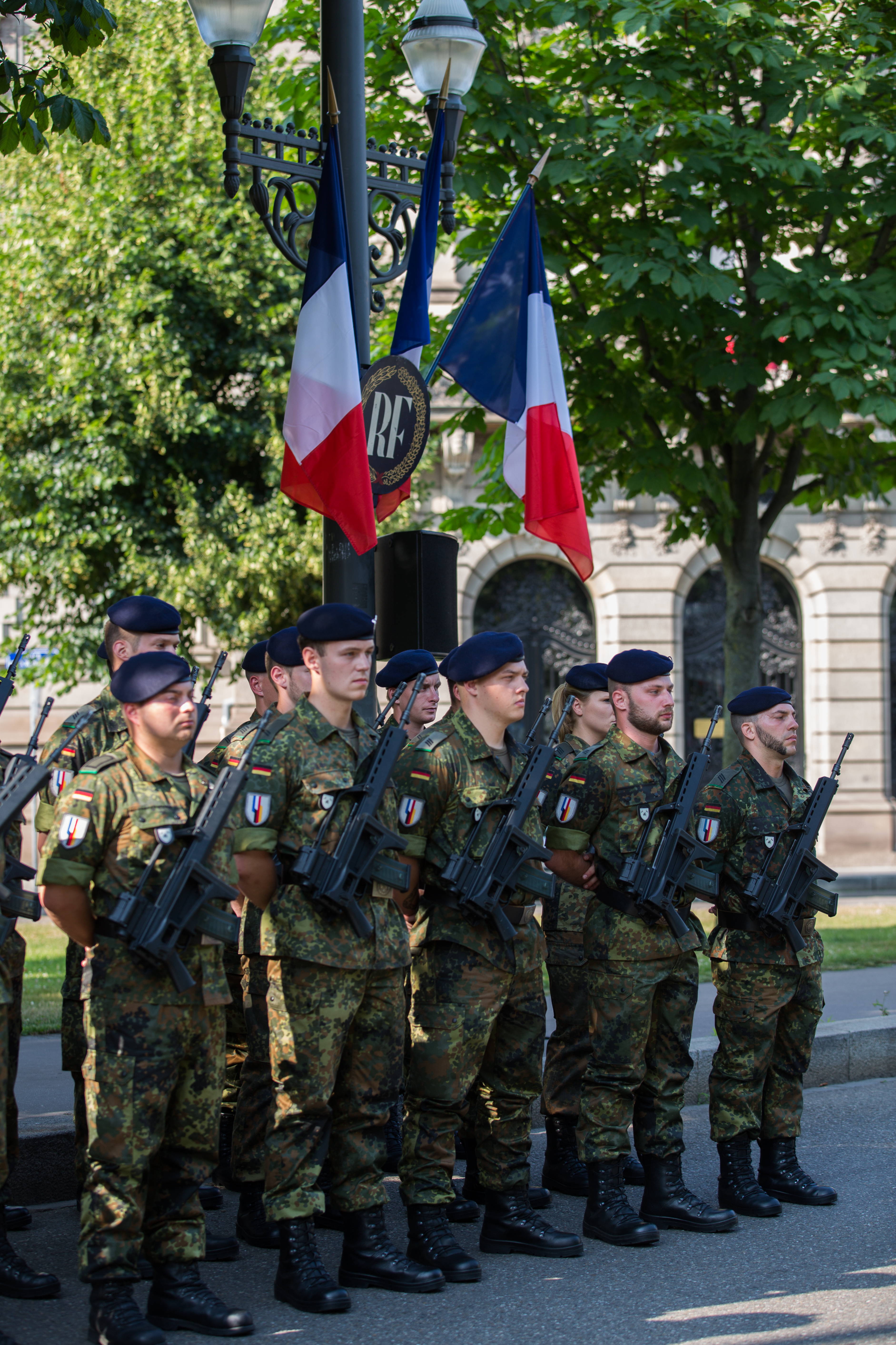 Détachement du 291e Jägerbataillon de la Brigade Franco-Allemande à Strasbourg place de la République lors du défilé du 13 juillet 2013.